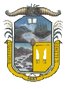 Escudo del municipio Benitez. Estado Sucre. Venezuela